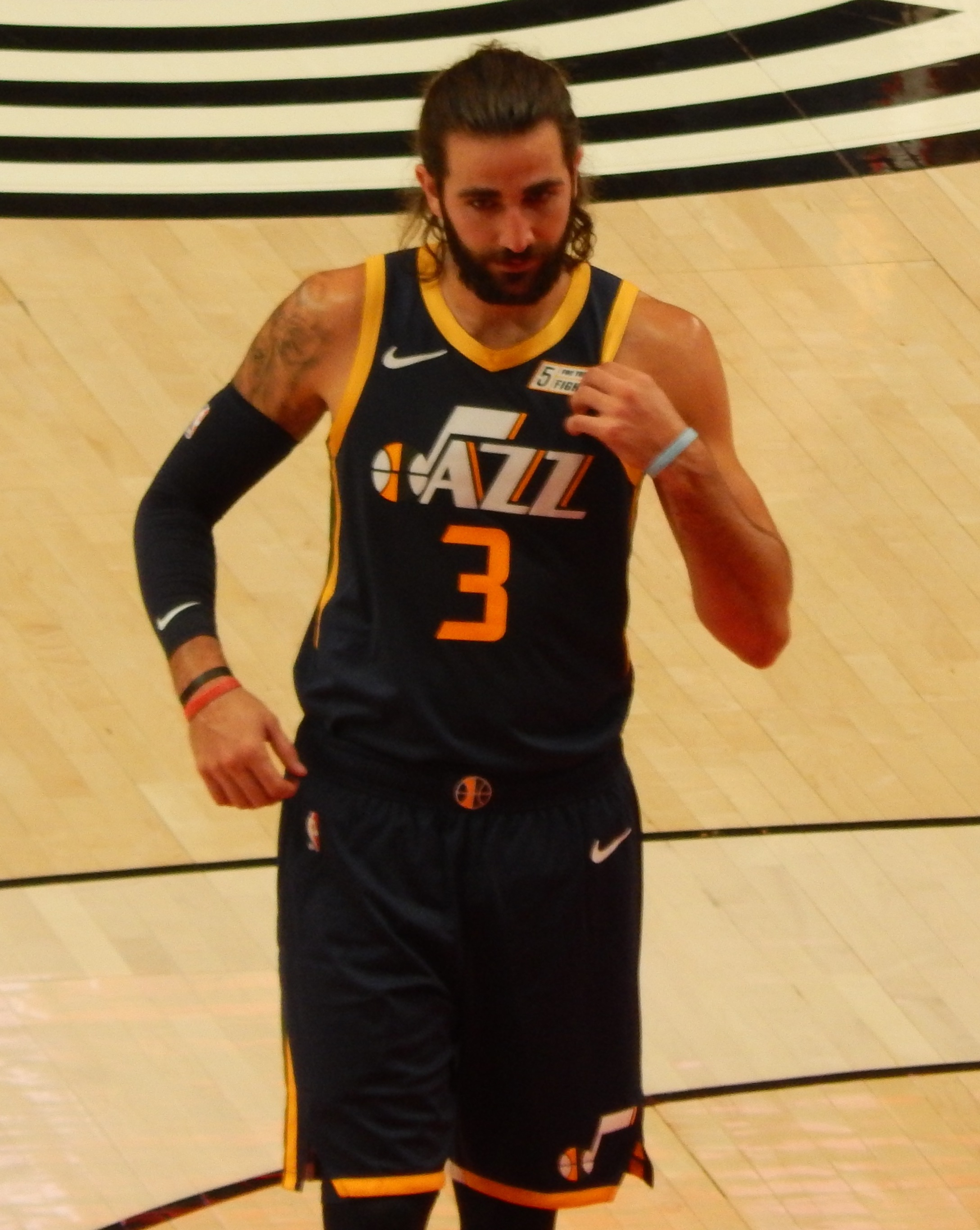 Ricky Rubio #3 of the Utah Jazz against the Portland Trail Blazers on October 7, 2018 at Moda Center in Portland, Oregon.